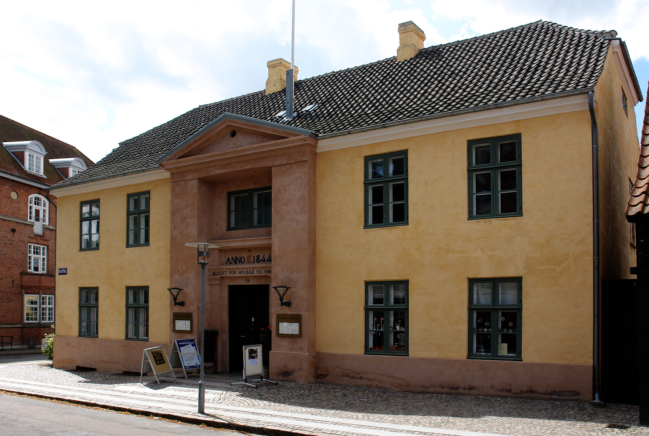 Holbæk Museum: Klosterstræde 18 - Das alte Rathaus von 1844